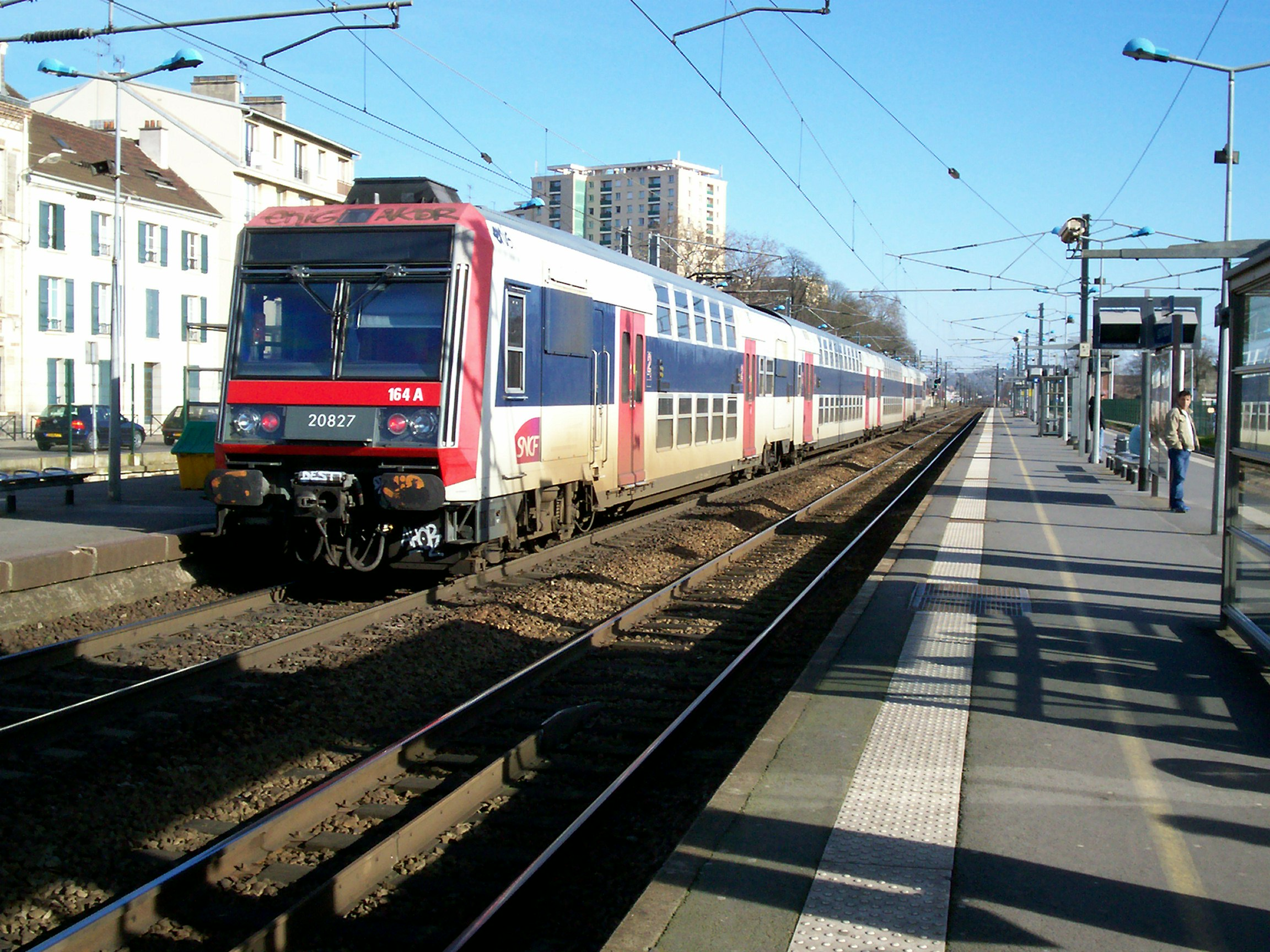 Rame Z 20500 en gare de Lagny-Thorigny et en direction de Meaux